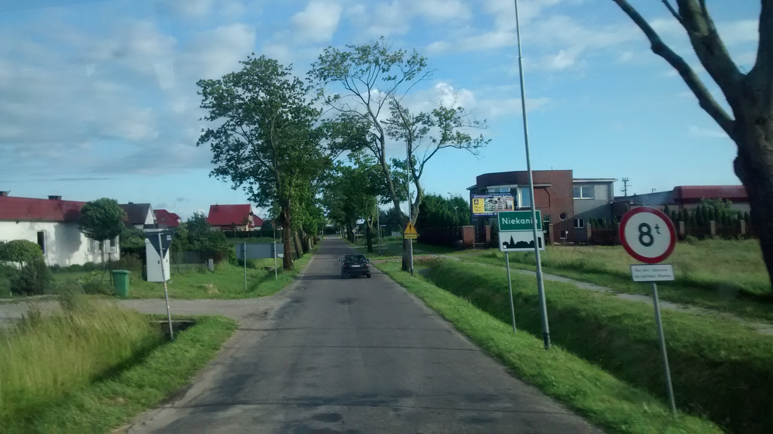 Wjazd do Niekanina